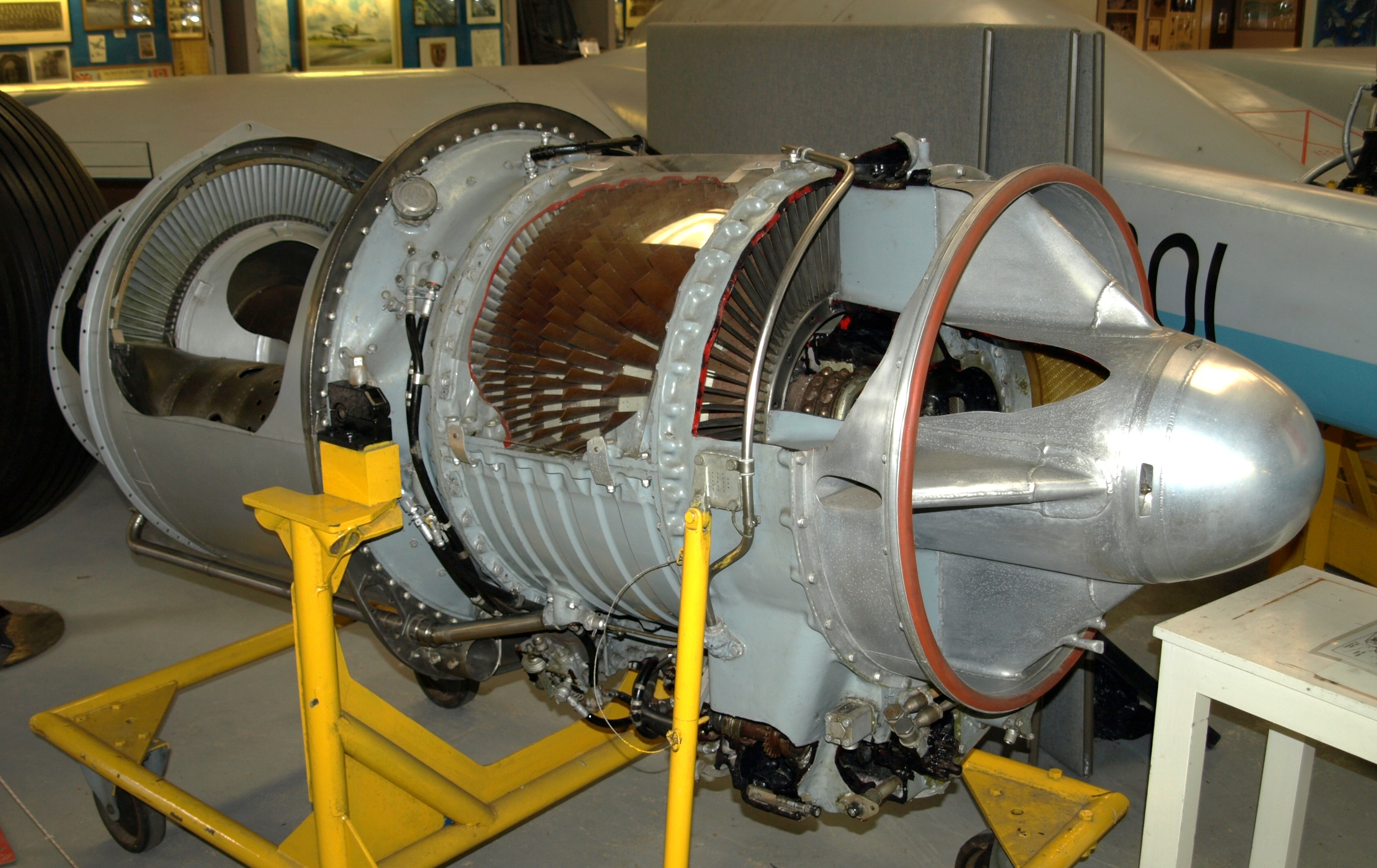 Bristol Orpheus jet engine